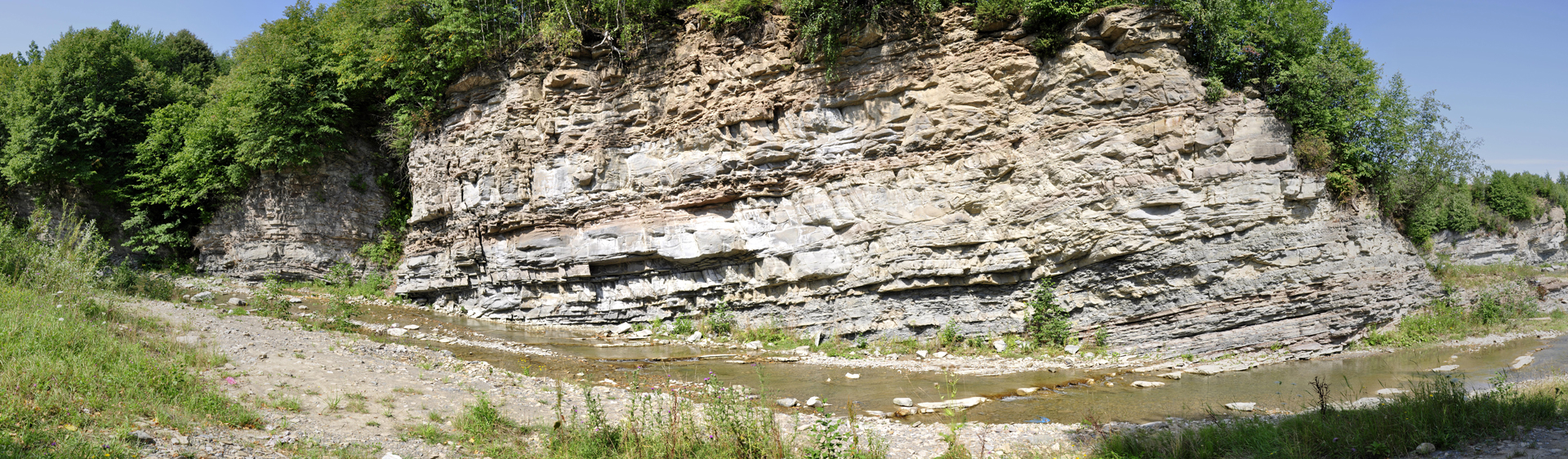 Панорама при р. Ослава